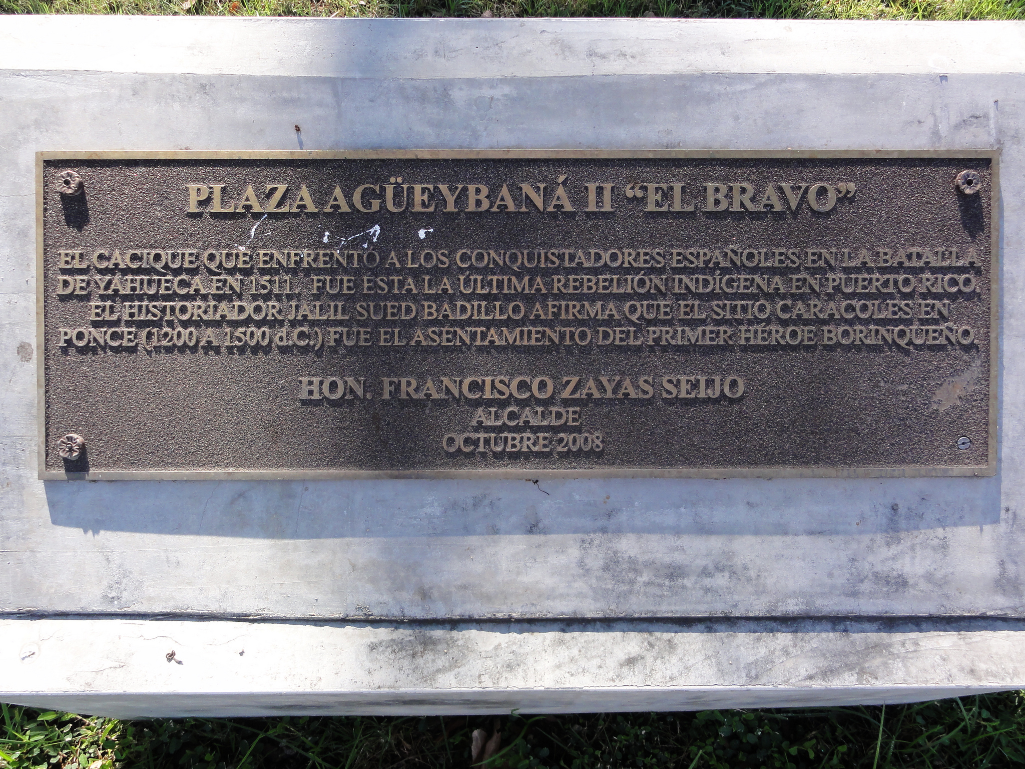 Placa en el Parque Monumento Agüeybaná II, El Bravo, Parque Monumento Agüeybaná II, El Bravo, en la interseccion del Ponce Bypass y la Ave. Hostos, barrio Playa, Ponce, Puerto Rico